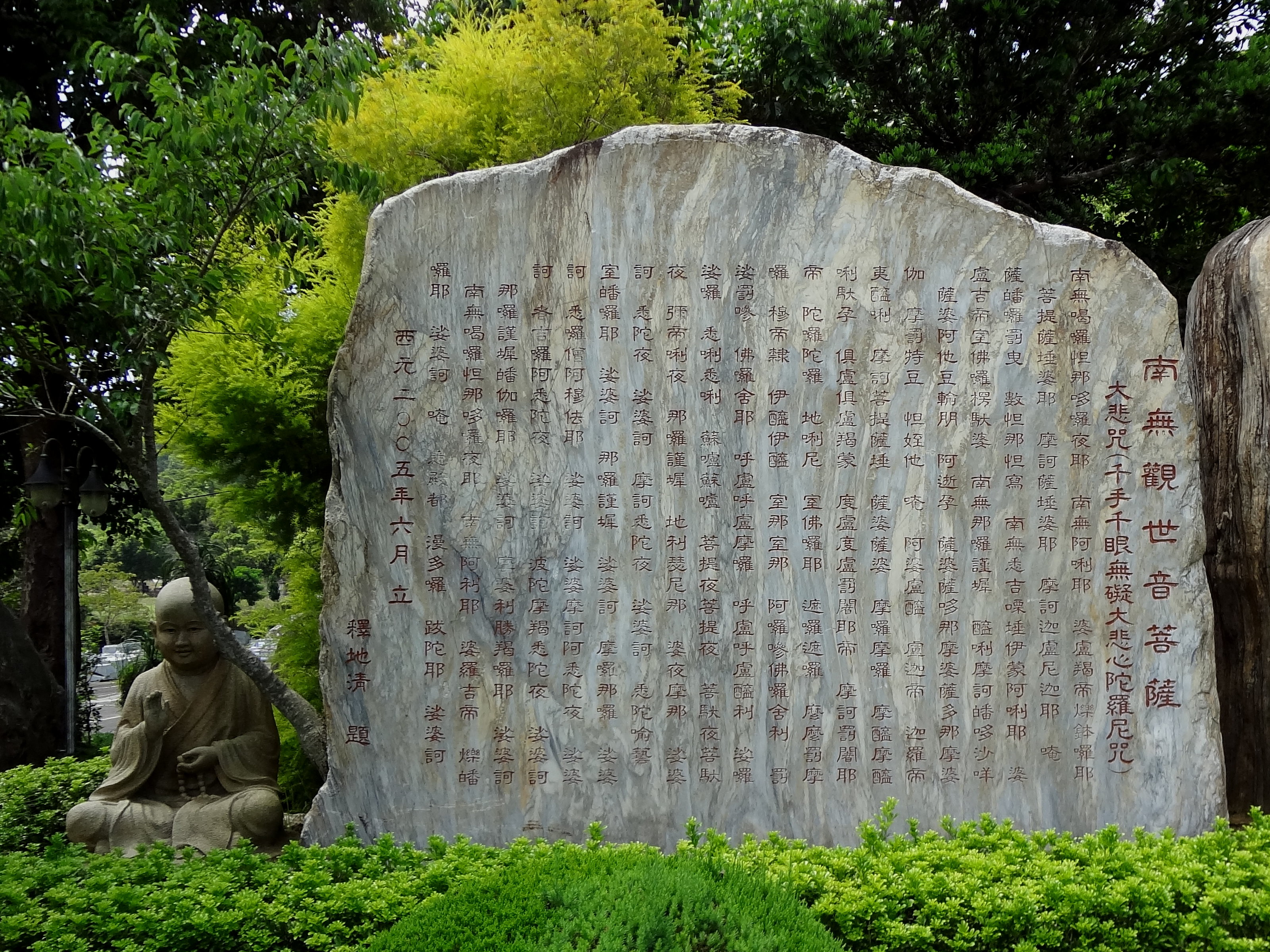 中文（台灣）: 佛頂山朝聖寺三義道場大悲咒石碑，2005年6月立，釋地清題。